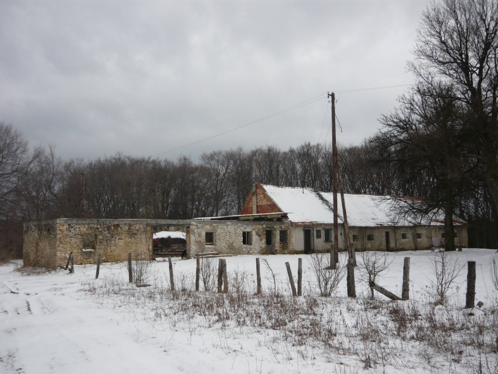 Ráktanya